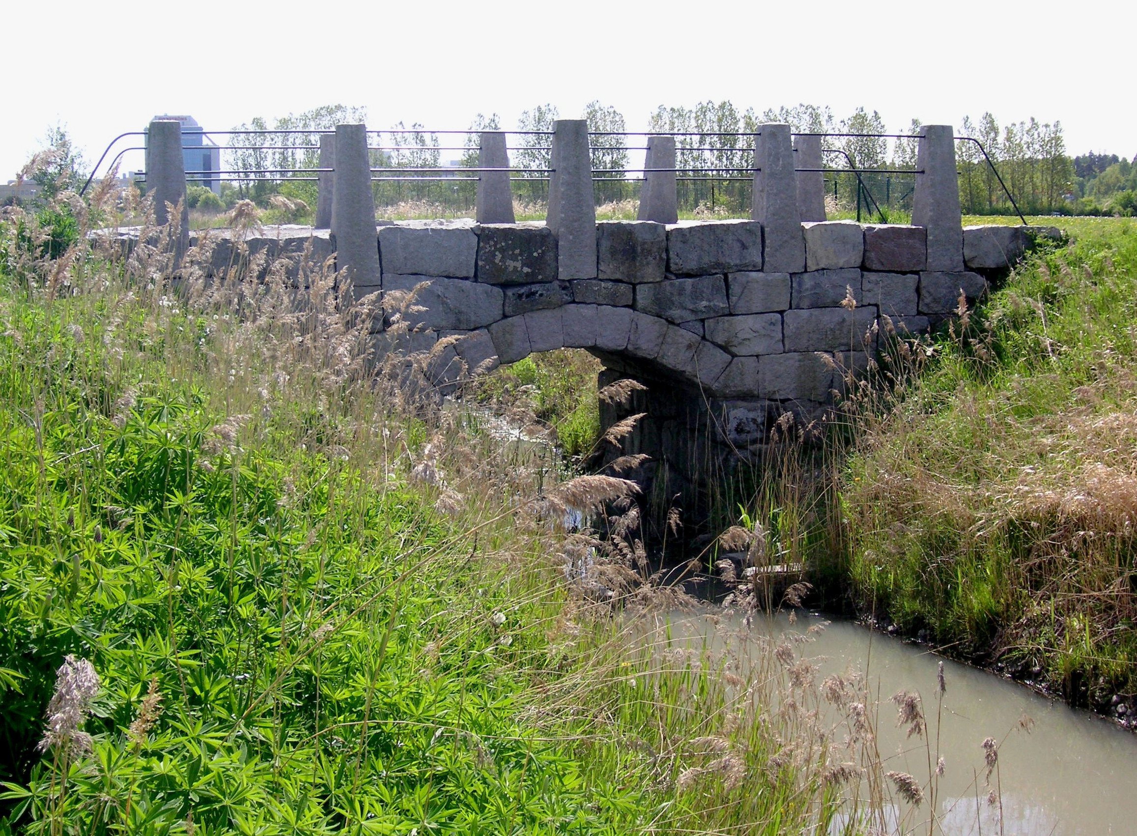 Göta landsväg, rekonstruerad stenvalvsbro på Årstafältet.